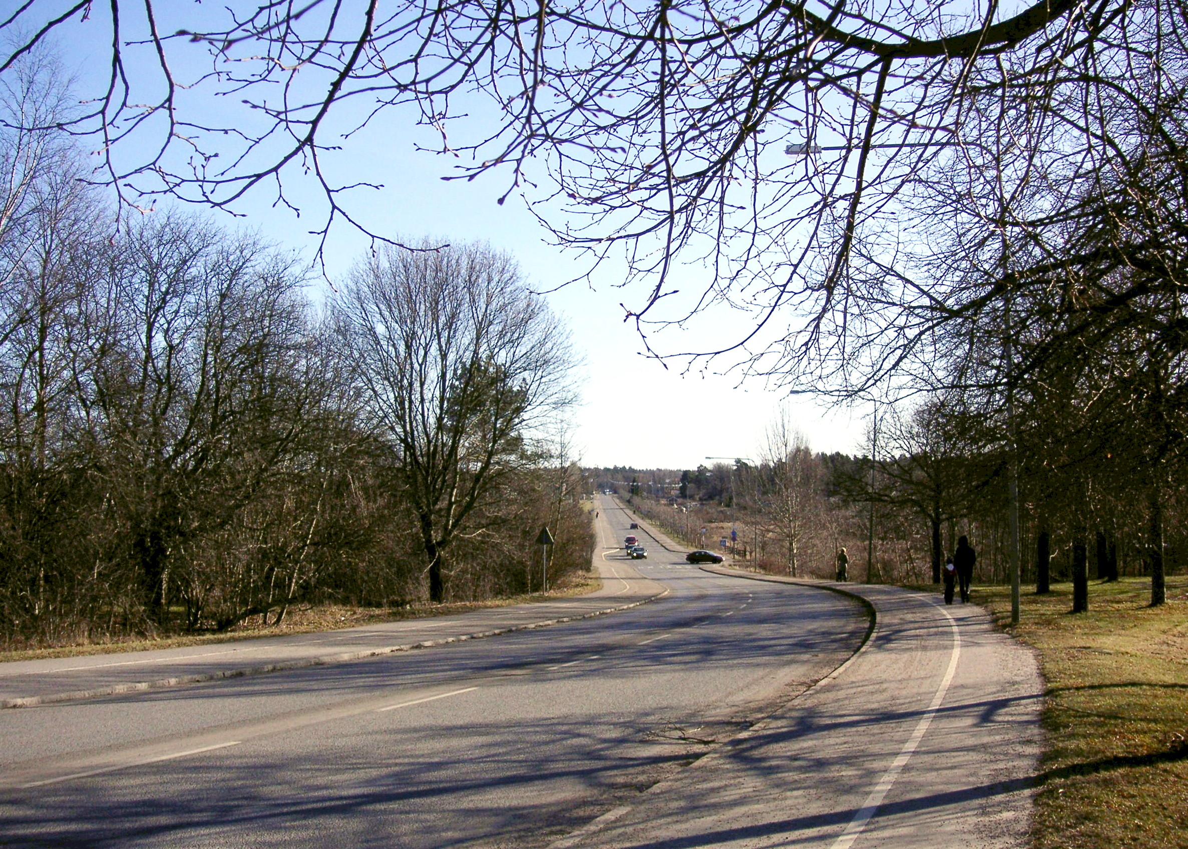 Gamla Tyresövägen i Stockholm